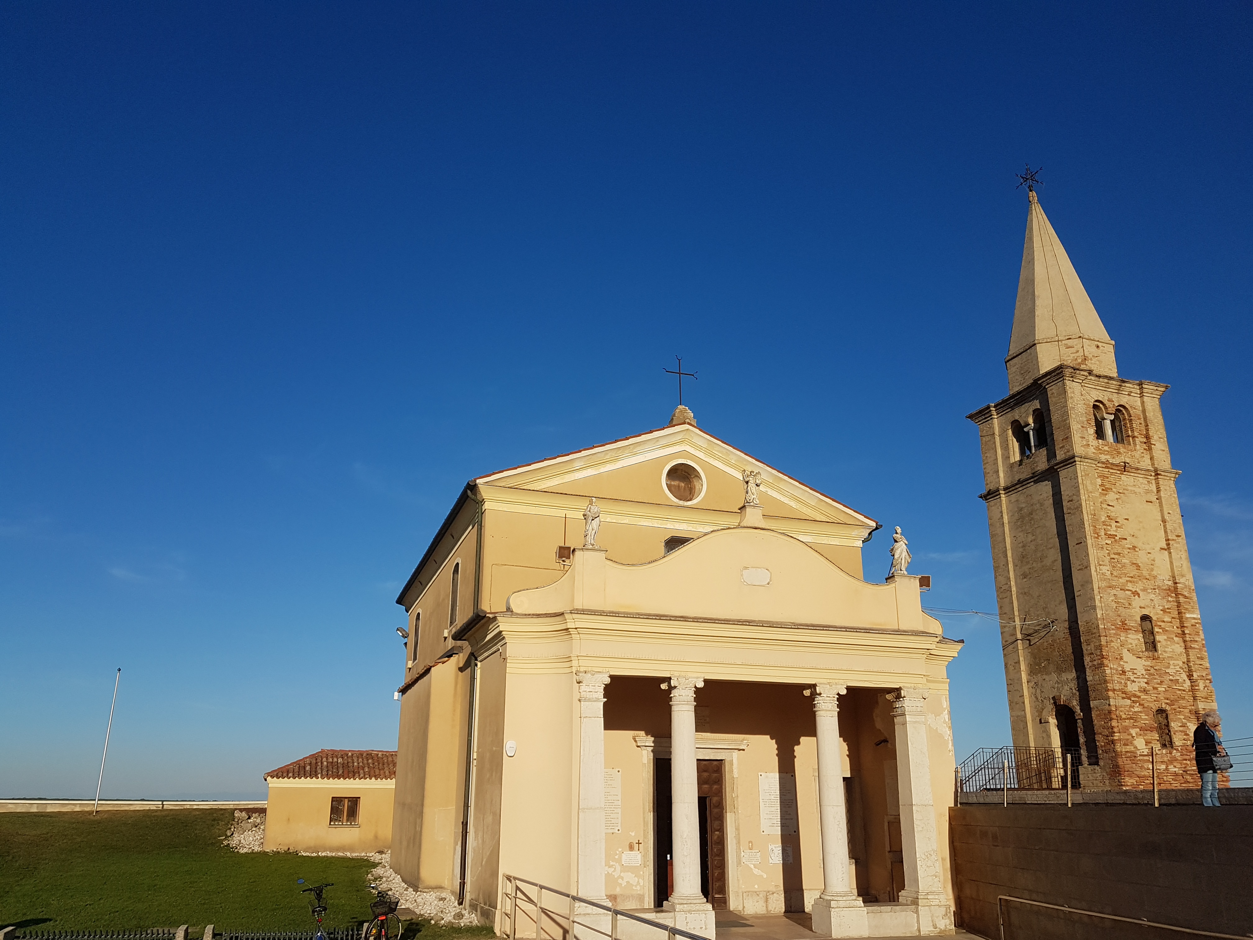 Santuario della Madonna dell'Angelo (Caorle)